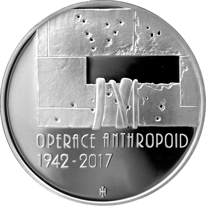 Памятная серебряная монета Чешского национального банка достоинством в 200 чешских крон, посвящённая 75-летней годовщине операции "Антропоид" (2017 год)